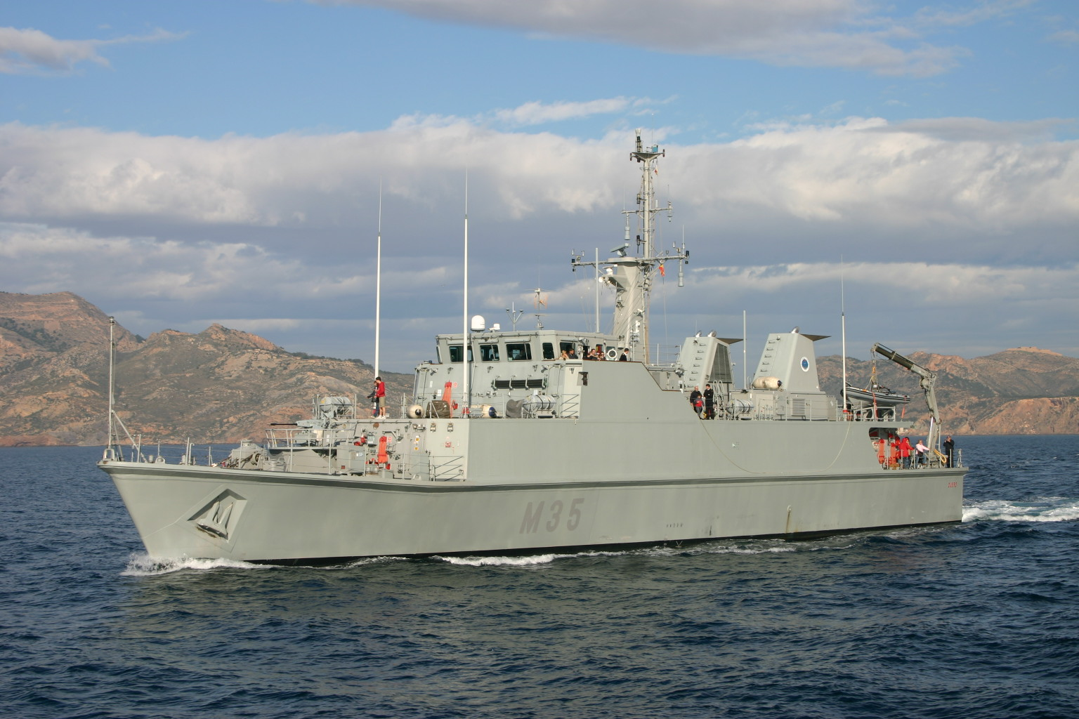 País: España Clase, [Tipo]: Segura, [MHC]. Constructor: Izar, Cartagena, España. Fecha botadura: 28 de abril de 2003. Fecha alta: 5 de julio de 2004. Desplazamiento ( toneladas ): 550 a plena carga. Dimensiones ( metros ): 54 x 10,7 x 2,2 Propulsión: 2 x diesels MTU-Bazán 6V 396 TB83 ( 1523 cv ). Velocidad ( nudos ): 14; 7 en búsqueda. Autonomía ( millas ): 2.000 a 12 nudos. Dotación: 33 + 7. Cañones: 1 x Oerlikon 20mm/85 GAM-B01. Rádar: Navegación: Kelvin Hughes Type 1007, banda I. Sónar: Indra-Raytheon-Thomson-Marconi SQQ 32, HF. Contramedidas: Cazaminas: sistemas Kongsberg Minesniper. Indicativo: EBIF Base: Cartagena.